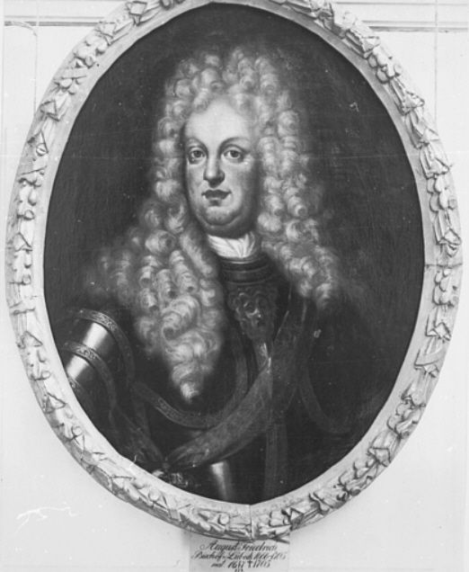 August Friedrich von Schleswig-Holstein-Gottorf (* 1641; † 1705), Prinz von Holstein-Gottorf und Fürstbischof von Lübeck.